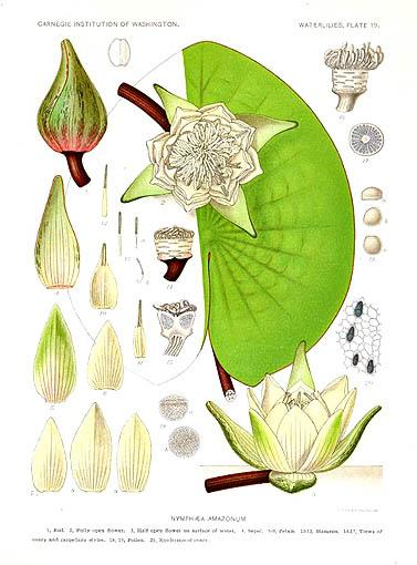 Nymphaea amazonum subsp. amazonum